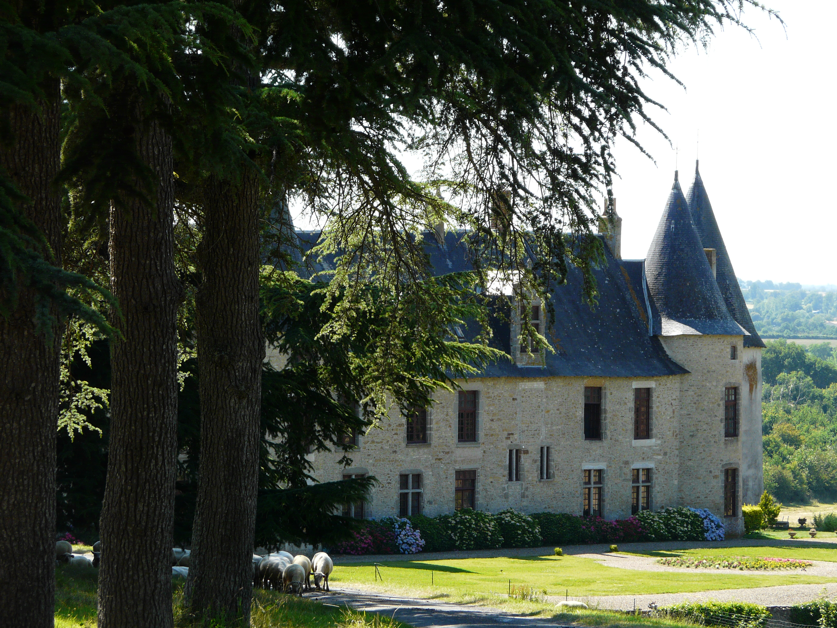 Le château de la Roche Faton, Lhoumois, Deux-Sèvres, France .